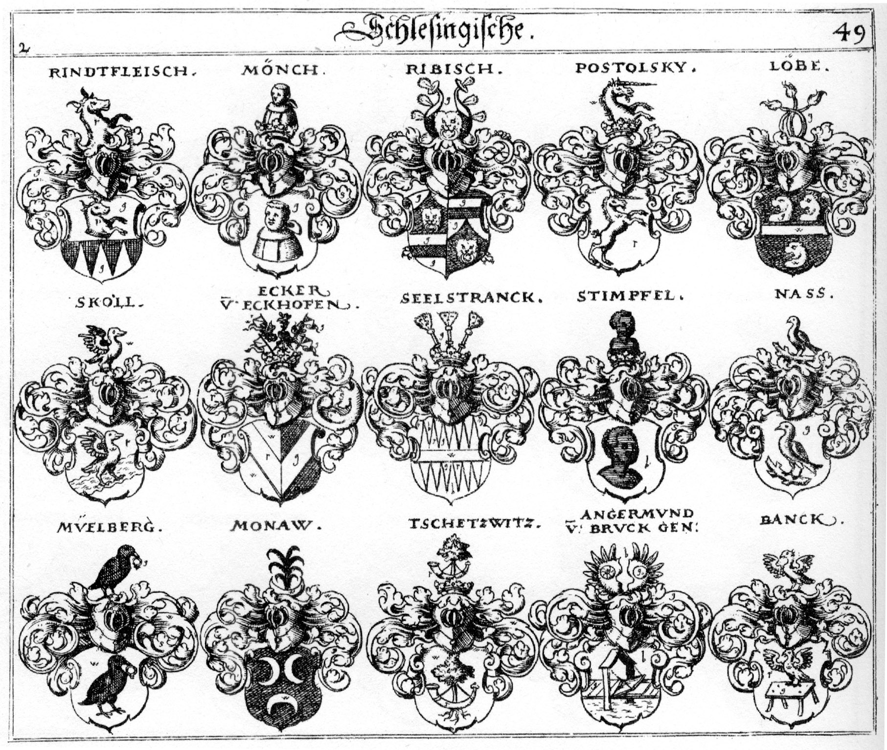 Siebmachers Wappenbuch, Tafeln der 9. Ausgabe 1701 und der 10. Ausgabe 1705, nach dem Faksimile von 1975. Tafel aus Teil 2.